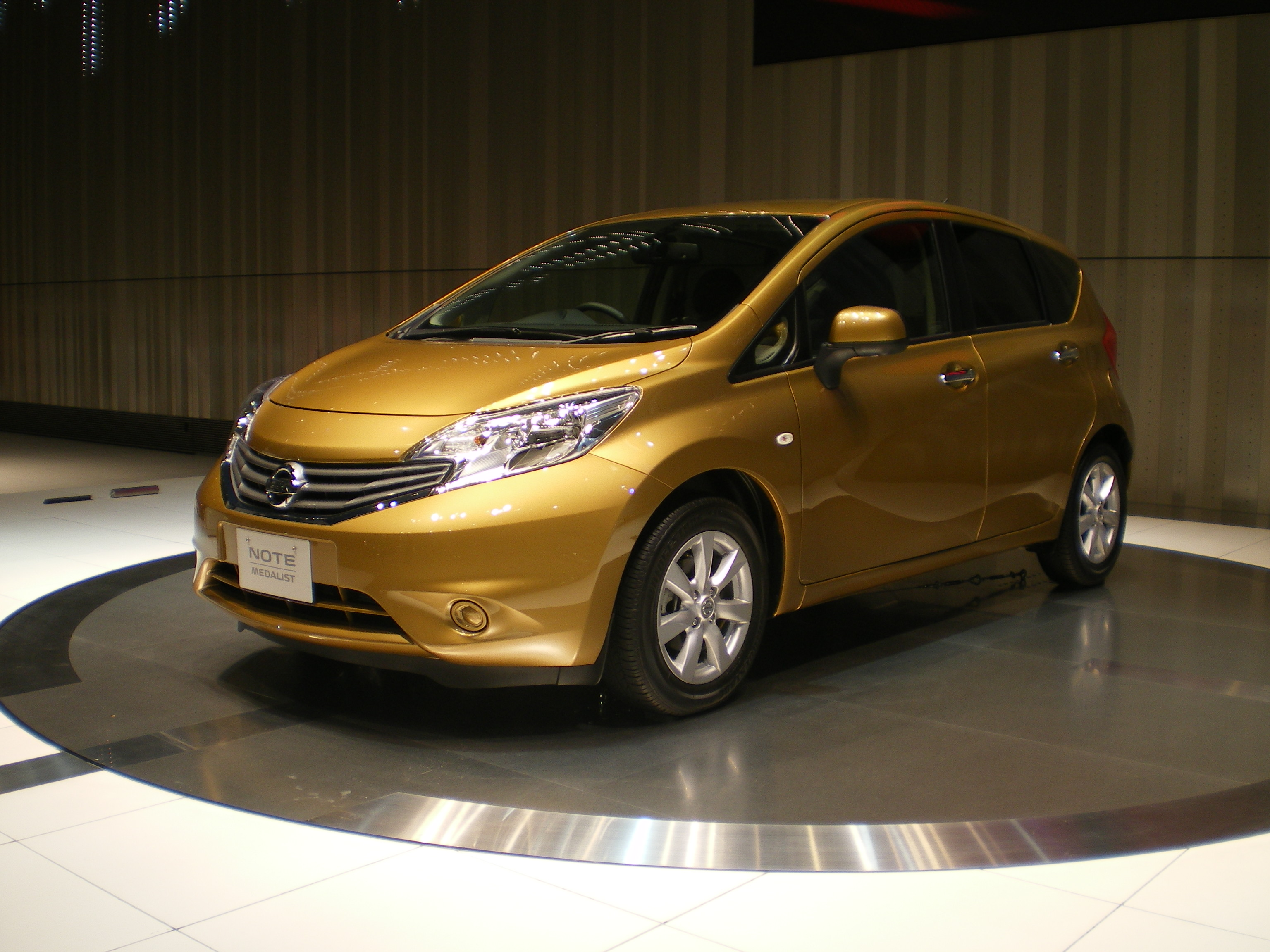 日産・ノート